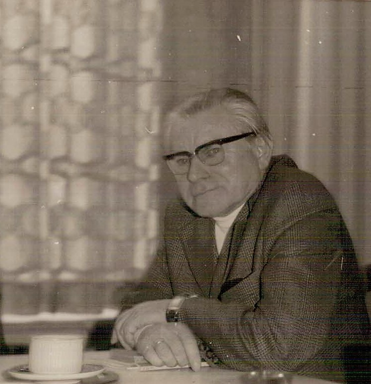 Eberhard Achterberg, 1974 in Preetz (Fachgymnasium des Kreises Plön)